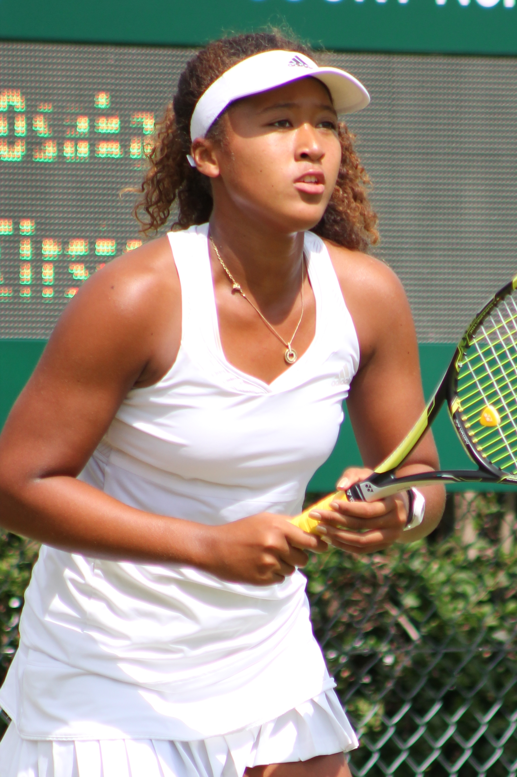 Osaka WMQ15 (6)